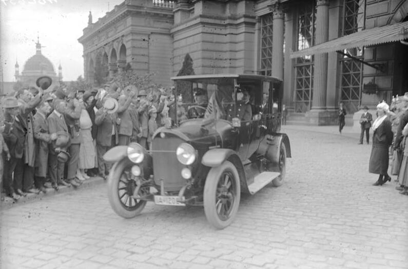 Die Ankunft des mexikanischen Präsidenten Calles in Berlin. Präsident Calles wurde auf dem Lehrter Bahnhof vom Reichspräsideten Ebert empfangen. Die begeisterte Menge bringt dem Auto mit dem Präsidenten Calles und Reichspräsidenten Ebert große Ovationen dar.